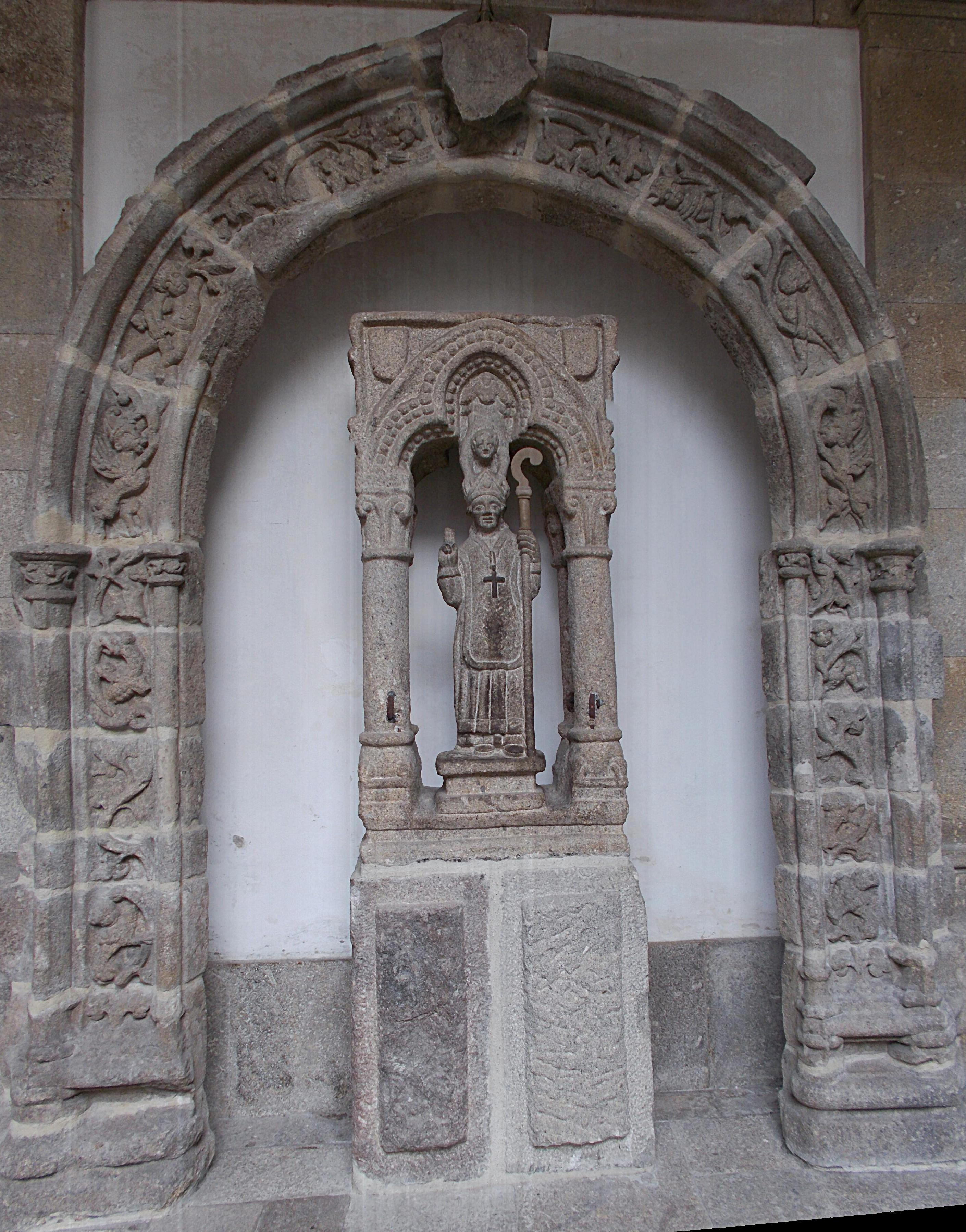 Portal da antiga Igreja de São Vicente da Ponte (Vila Verde), no claustro da Sé de Braga. Certamente salvo pelo Padre João Freitas de Caldelas.